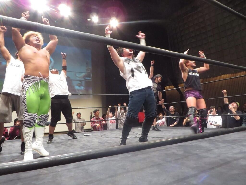 ガンバレ☆プロレス 第二章 旗揚げ戦 北沢タウンホール